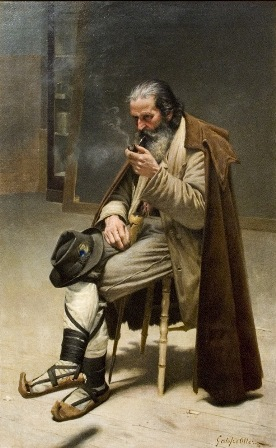 Un model